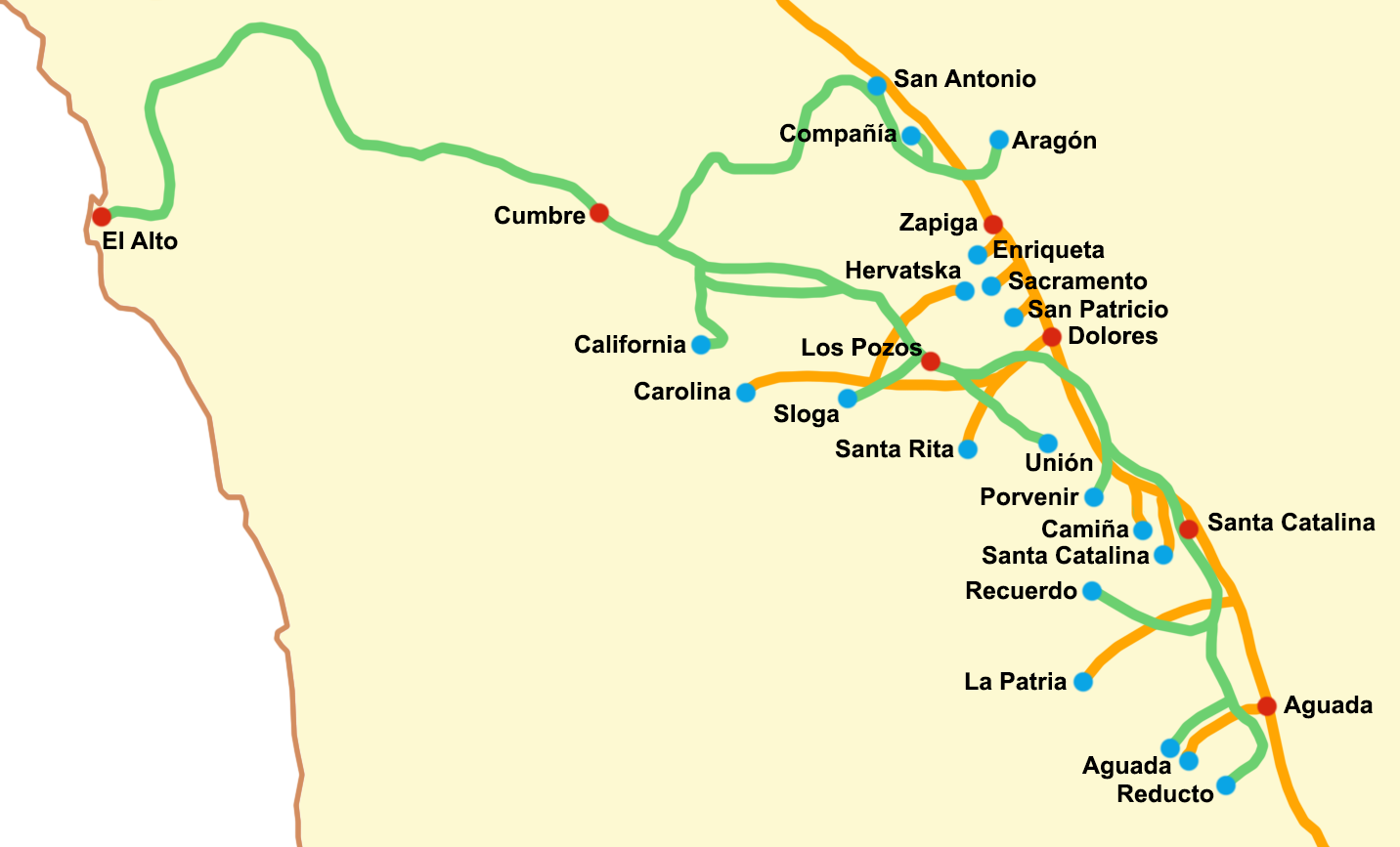 Mapa del trazado del Ferrocarril de Junín (en color verde) hacia 1920. Las oficinas salitreras aparecen marcadas en celeste y las estaciones en rojo, mientras que la línea naranja corresponde al Ferrocarril Salitrero de Tarapacá.